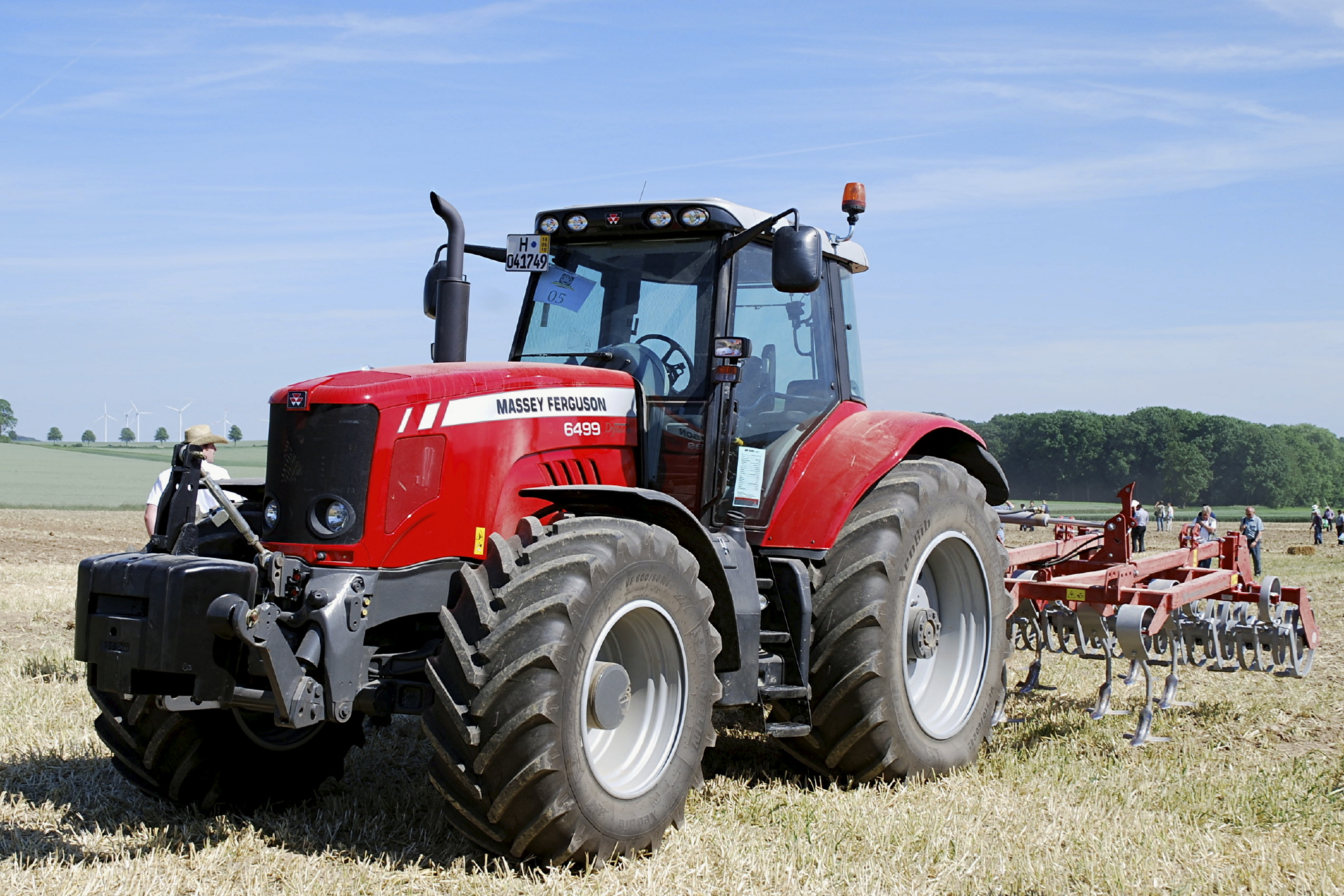 Massey Ferguson 6499 mit Kongskilde VibroFlex 7400; DLG-Feldtage 2010, Gut Bockerode, Springe-Mittelrode, Niedersachsen, Deutschland.